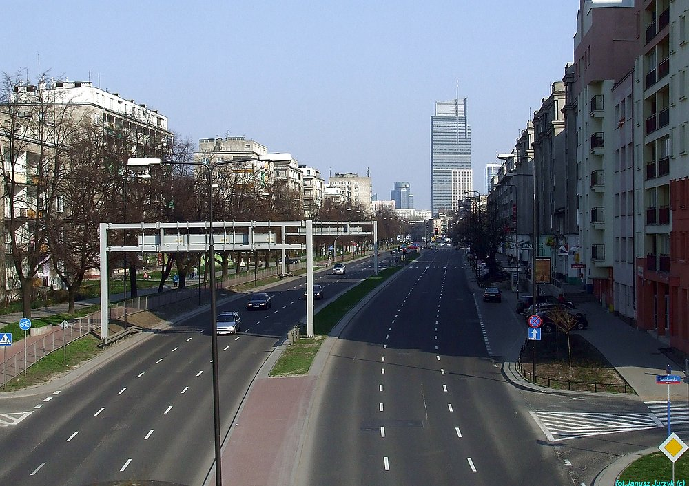 Warszawa ul. Górczewska